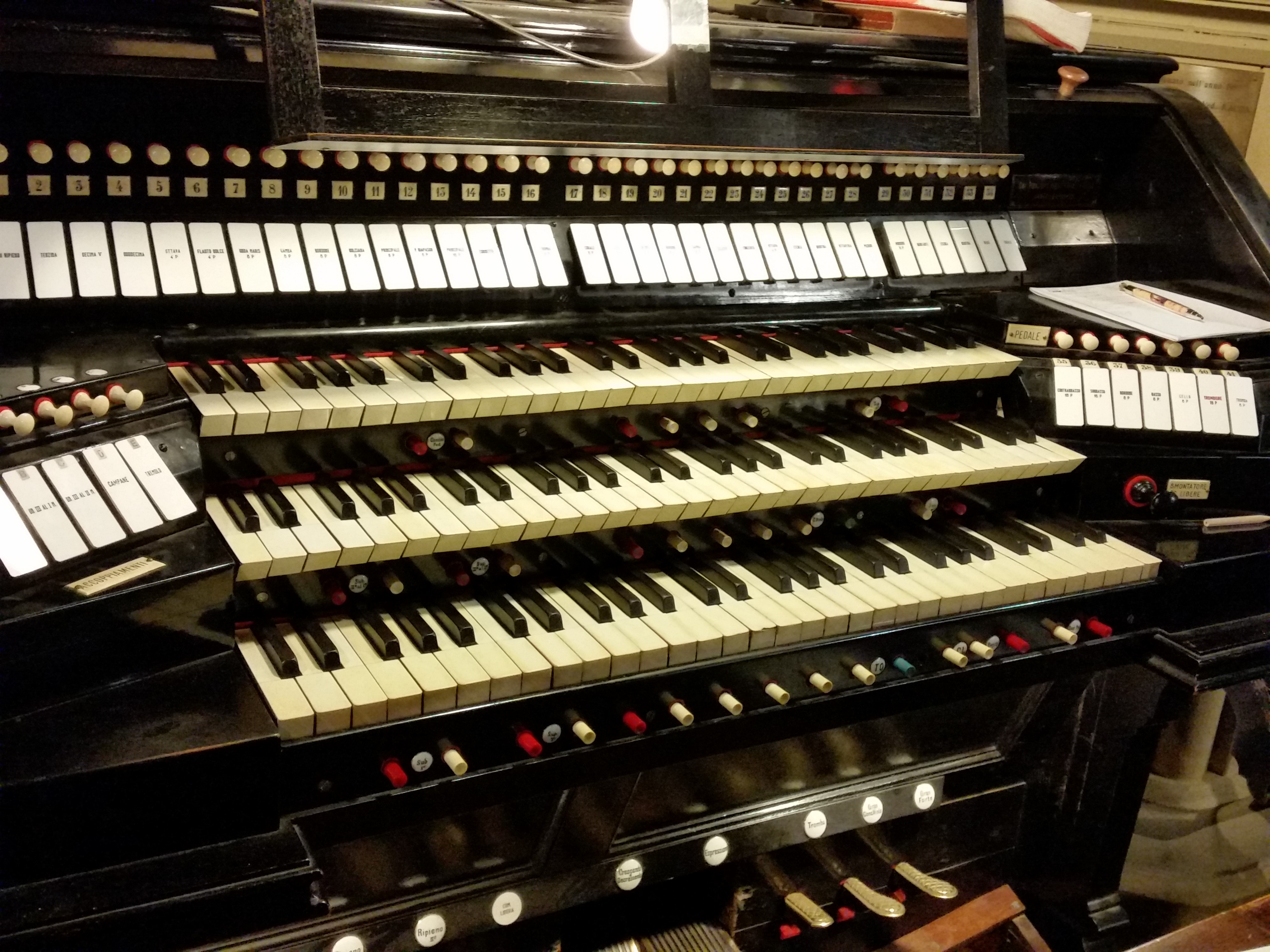 Consolle pneumatica a tre manuali dell'organo